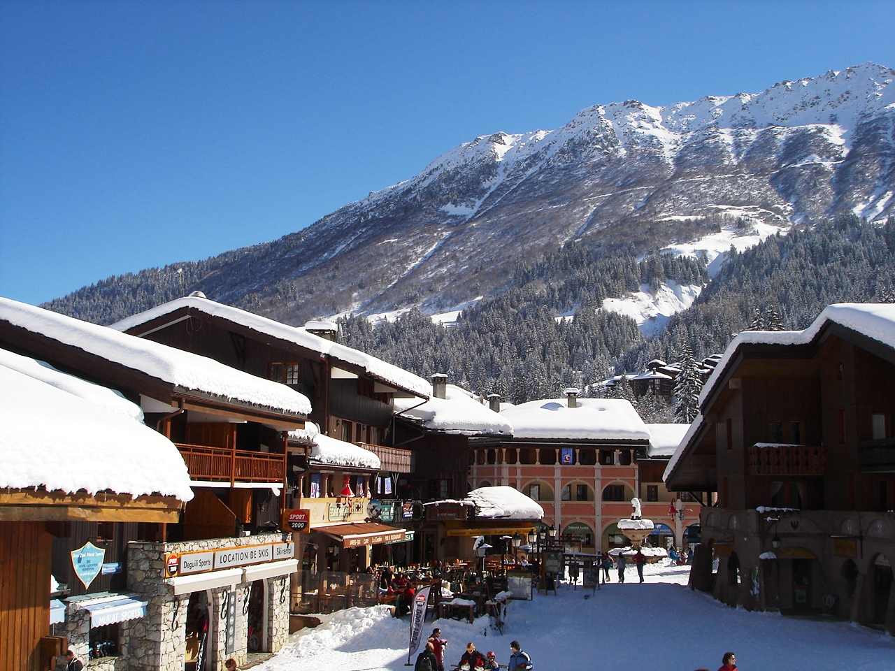 la rue piétonne du Bourg